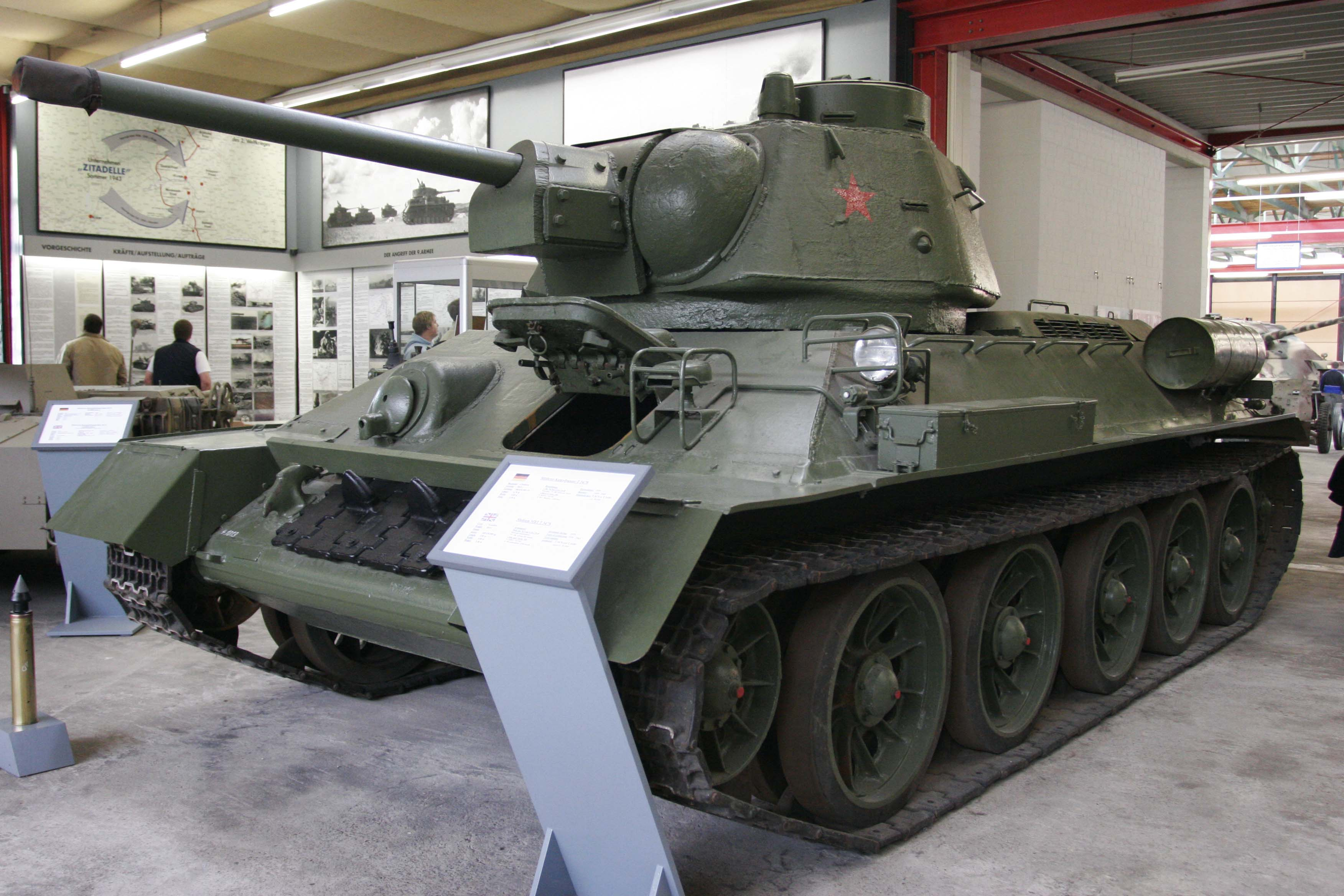 T-34/76 1943 Nut on display at the Deutsches Panzermuseum Munster , Germany.